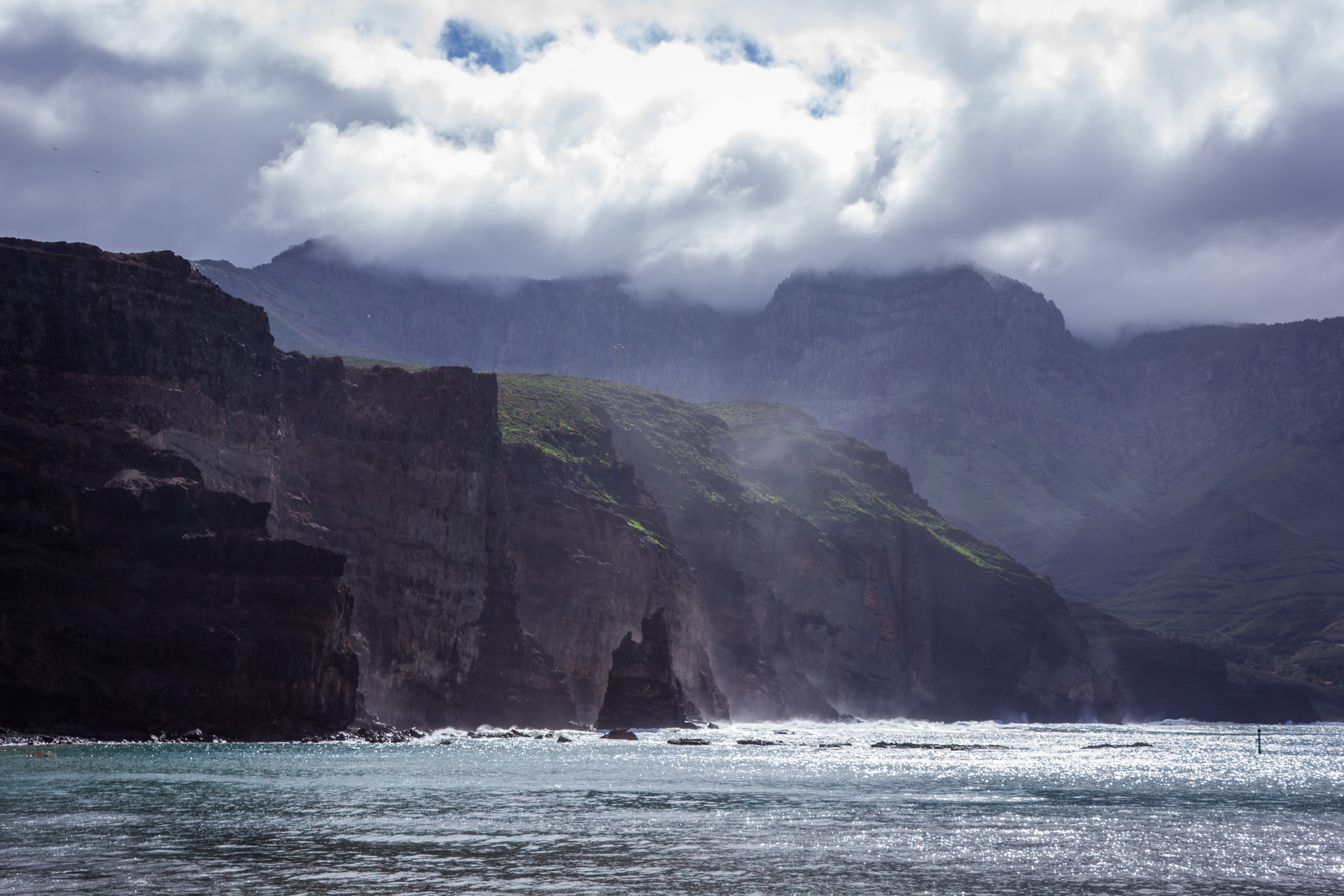 Vista de la costa del parque natural de Tamadaba desde el puerto de Agaete This is a photography of a Special Area of Conservation in Spain with the ID: ES0000111. Natura2000 entry, EEA entry